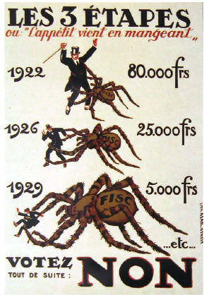 Abstimmungsplakat zur Eidgenössischen Volksinitiative «für die Einmalige Vermögensabgabe»